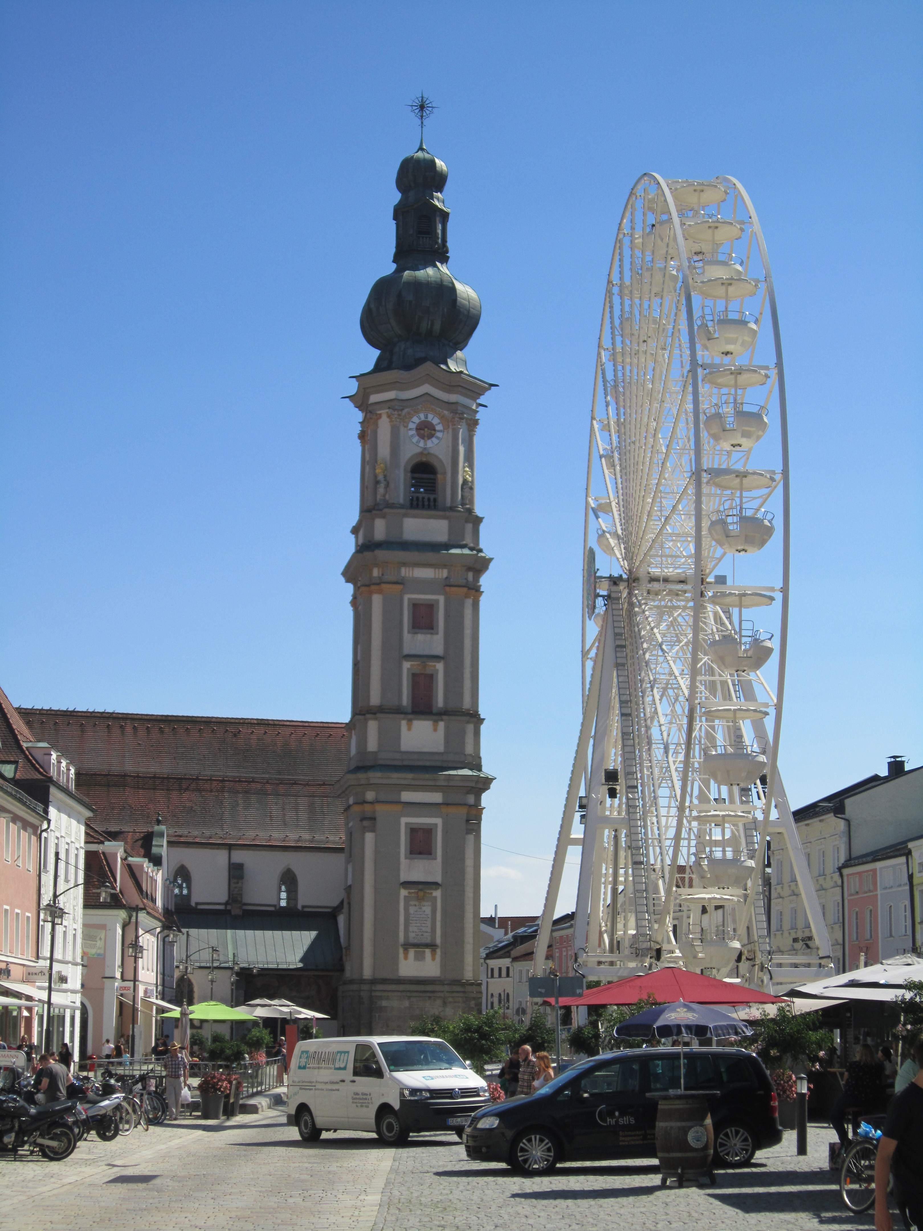 Riesenrad auf dem Luitpoldplatz in Deggendorf neben der Heilig-Grabkirche St. Peter und Paul als Aktion zur Unterstützung notleidender Schausteller während der COVID-19-Pandemie im Juli 2020